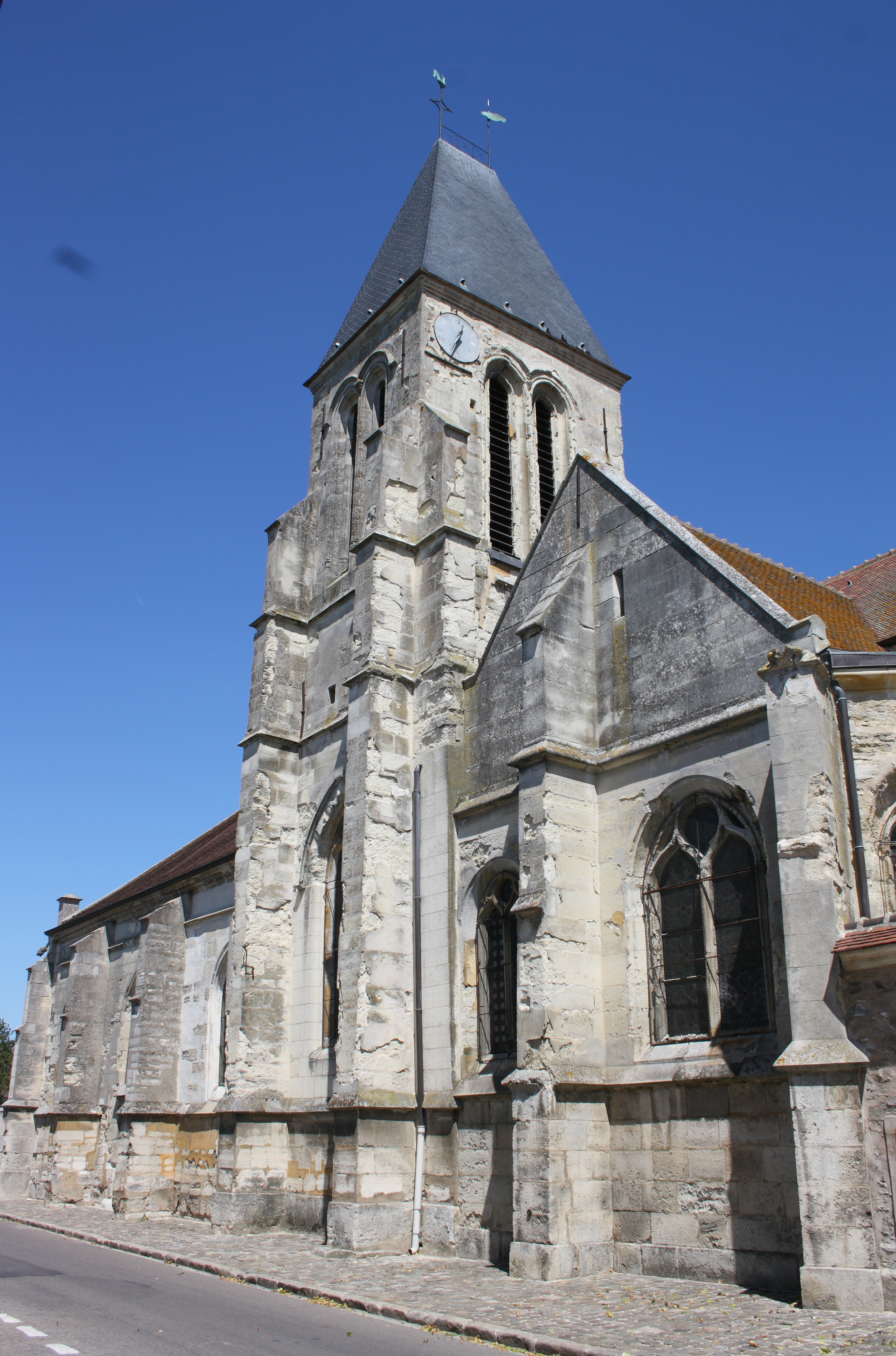 katholische Pfarrkirche Saint-Vincent-et-Saint-Arnould in Varreddes